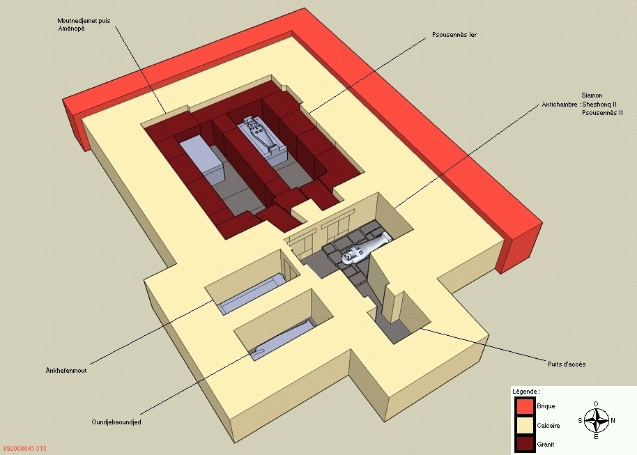 Vue en élévation de la tombe NRT III contenant les tombes de Psousennès Ier (21e d.), de sa femme Moutnedjemet, puis de leur fils Aménémopé, d'un autre fils du roi Ânkhefenmout, du général en chef du roi Oudjebaoundjed, et dans l'antichmabre le sarcophage de Sheshonq II (22e d.) entre les restes des momies de Siamon et de Psousennès II (ces trois derniers rois ont été déplacés dans cette tombe plus tard) - Nécropole royale de Tanis - XXIe et XXIIe dynasties égyptiennes